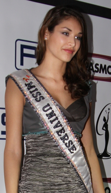 Miss Universe 2009 Dayana Mendoza en Managua, Nicaragua, apoyando la campaña de PASMO "Y vos, como te cuidás del SIDA"